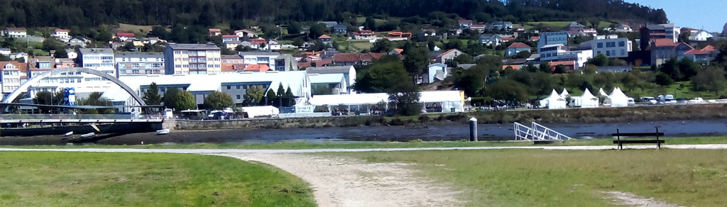 Festa do Pan de Neda en 2015